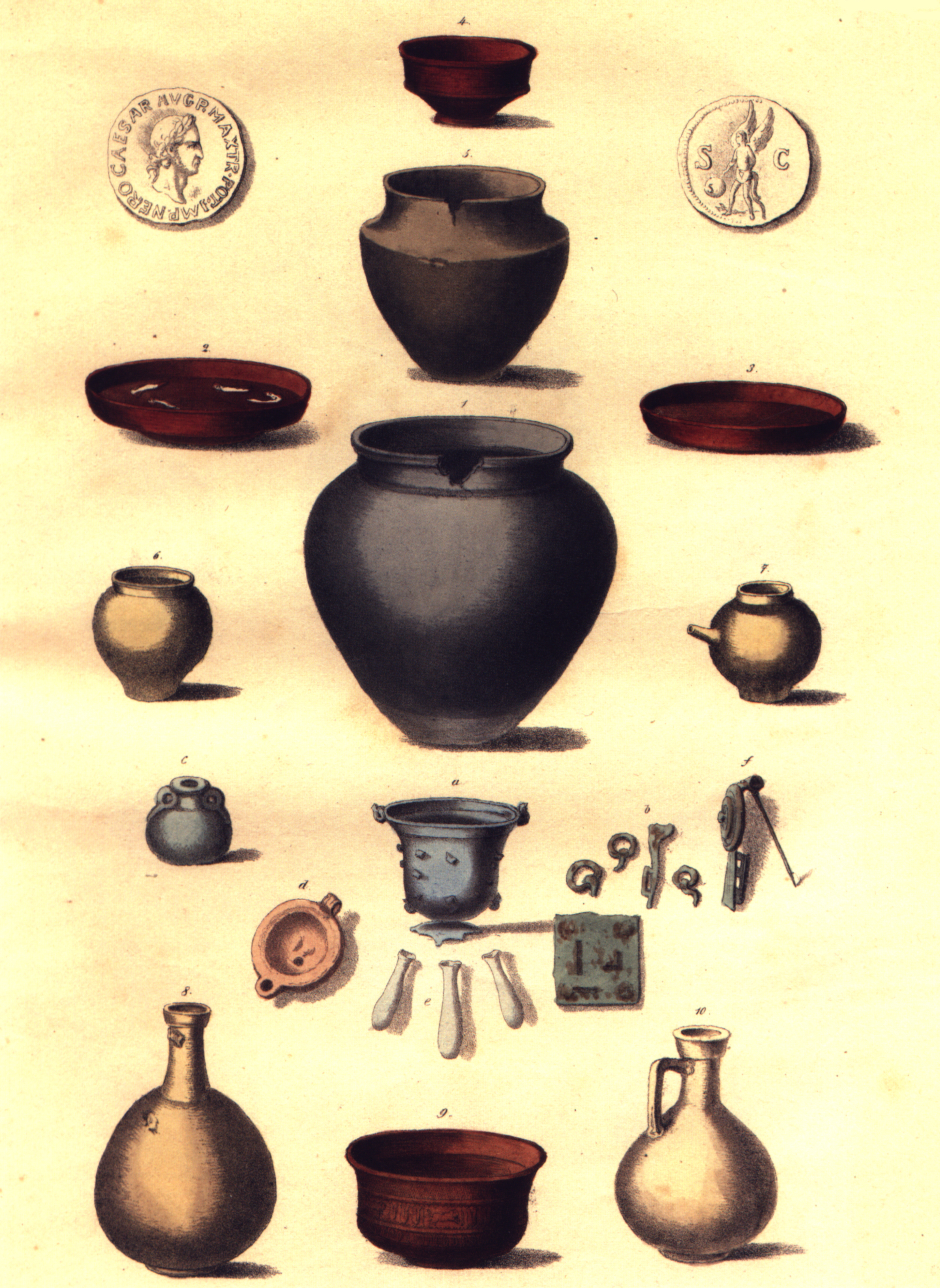 Römische Grabfunde aus Xanten; Abbildung aus Philipp Houben, Franz Fiedler: Denkmaeler von Castra Vetera und Colonia Traiana in Ph. Houben's Antiquarium zu Xanten. Xanten, Wesel 1839, Tafel 15; reproduziert in der unten angegebenen Quelle